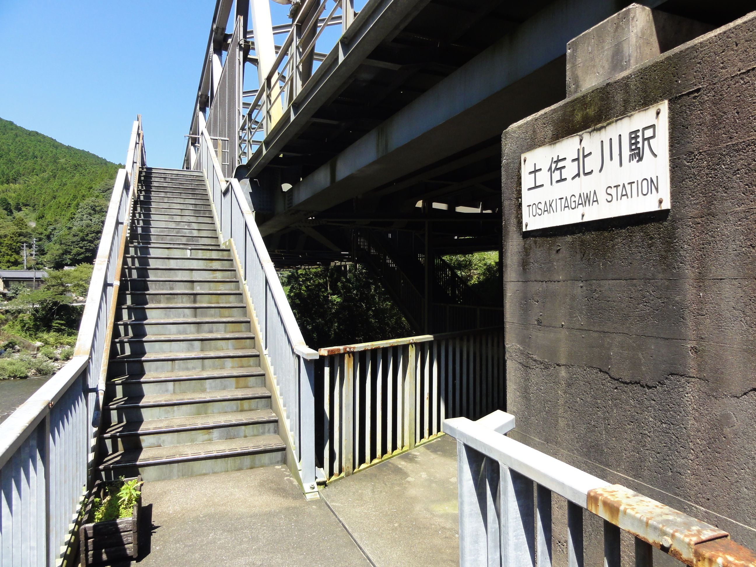 土佐北川駅 入口